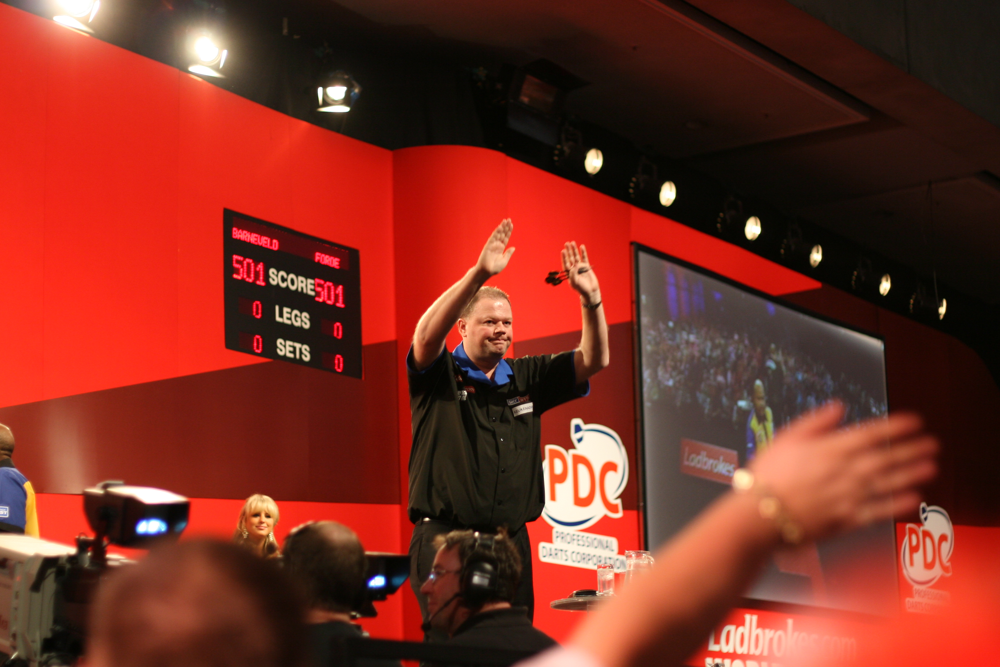 Raymond van Barneveld